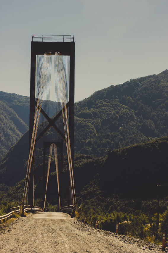 Puente colgante Yelcho, Carretera Austral, Chile